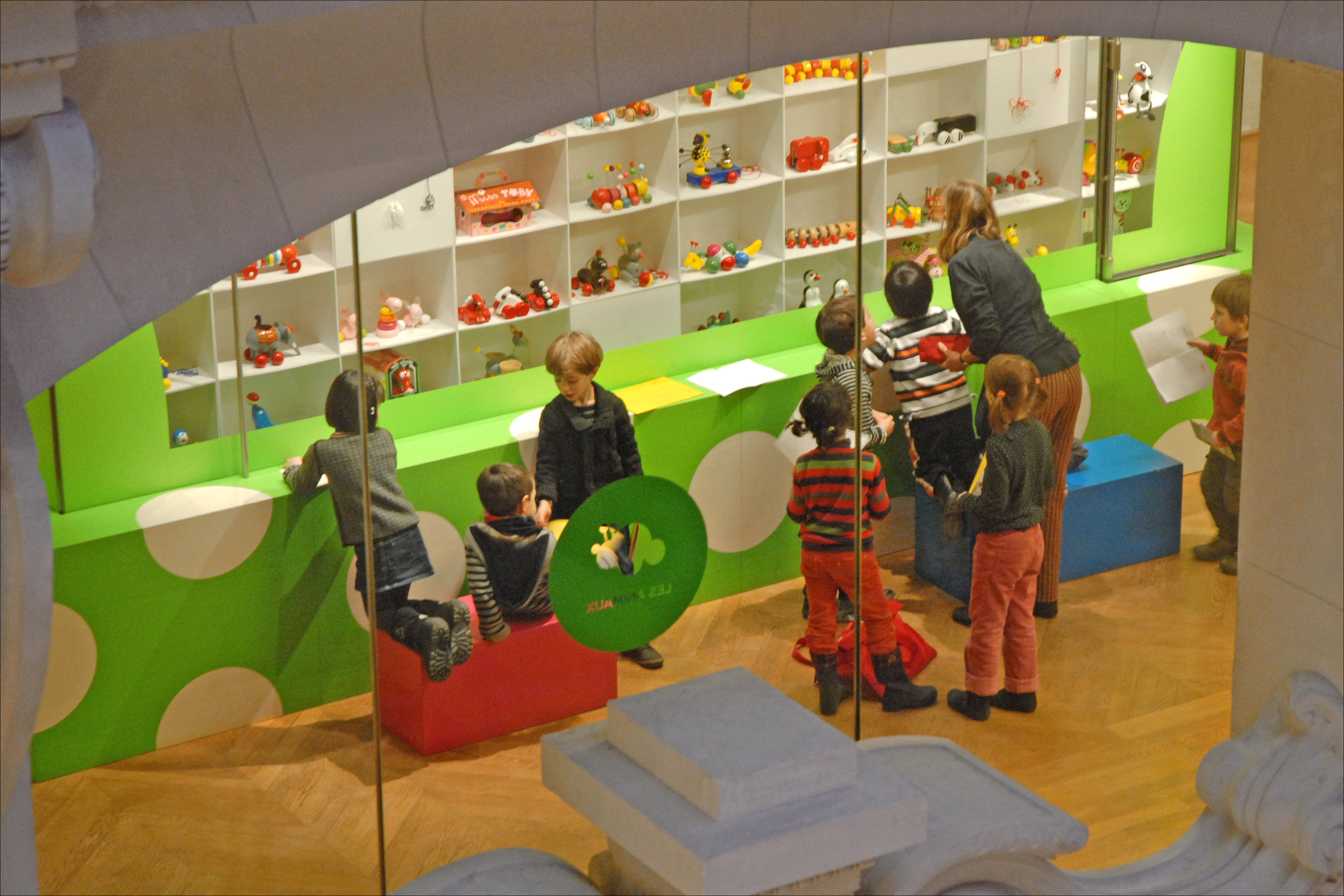 Groupe d'enfants dans l'exposition du musée des arts décoratifs "Vilac, 100 ans de jouets en bois"